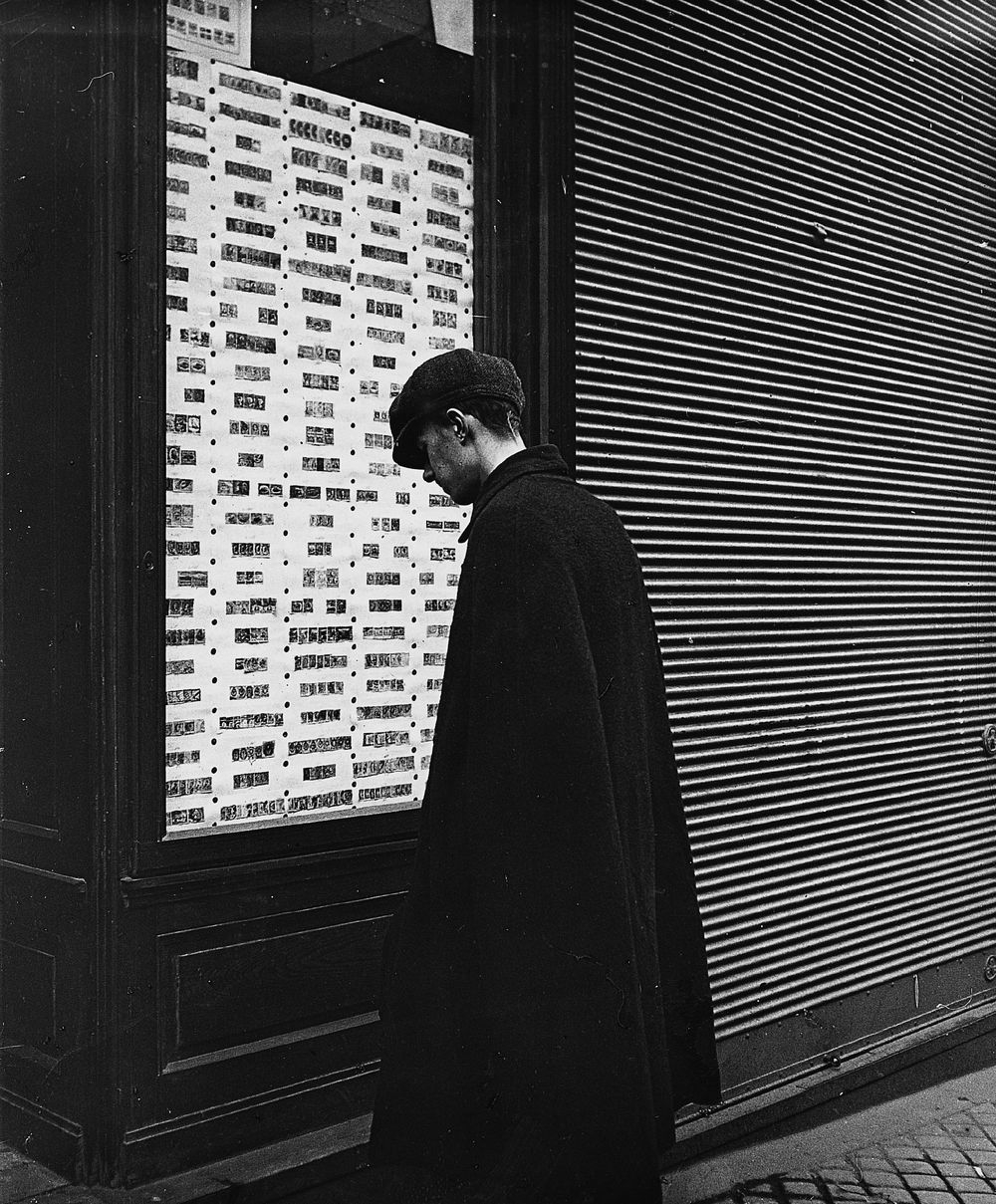 Vor dem Briefmarkengeschäft, Photographie aus Wien (WV 106)